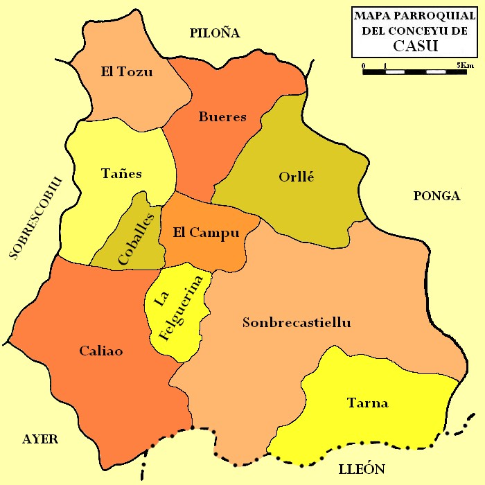 Mapa parroquial del conceyu de Casu.